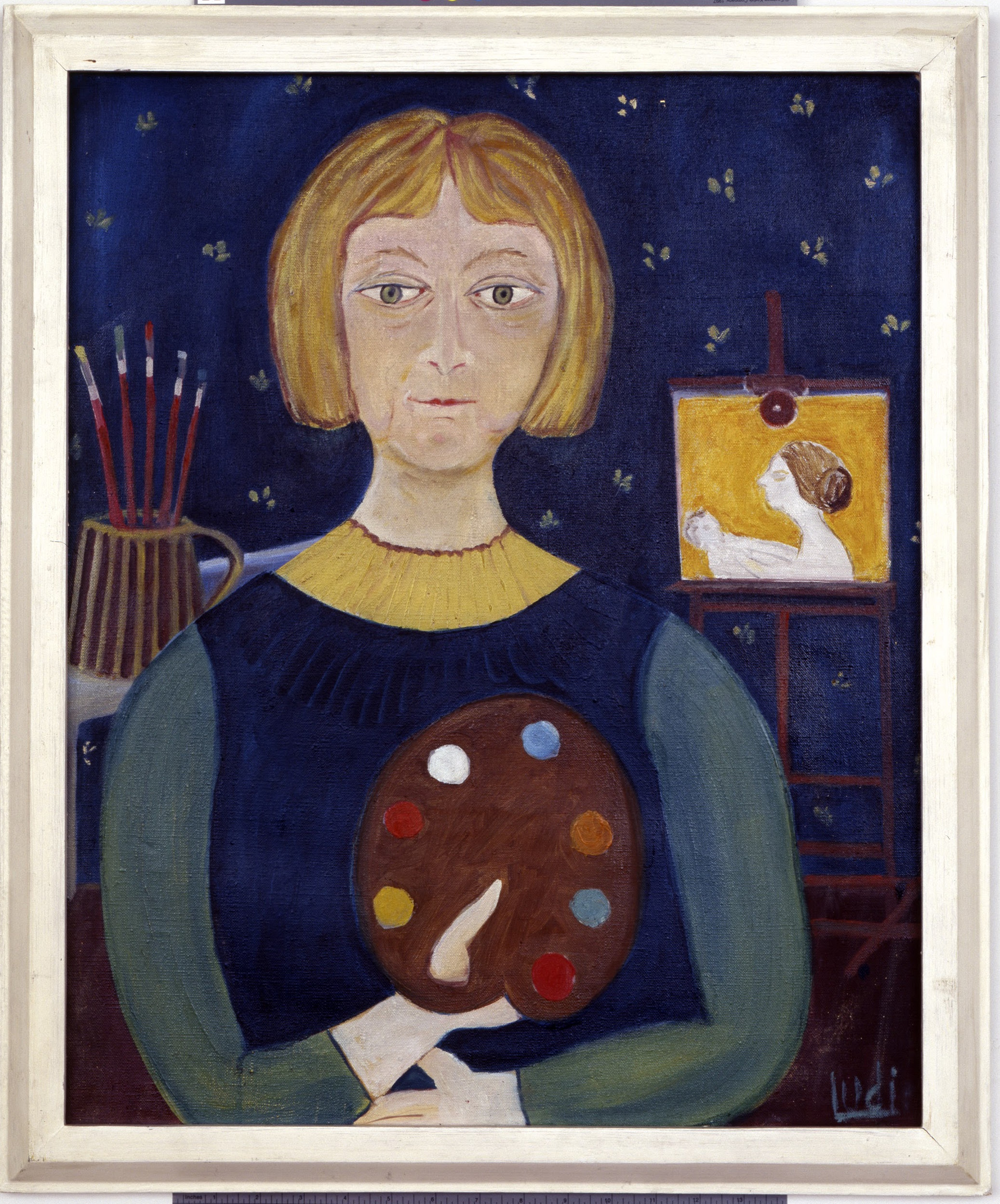 Autoportrét s paletou